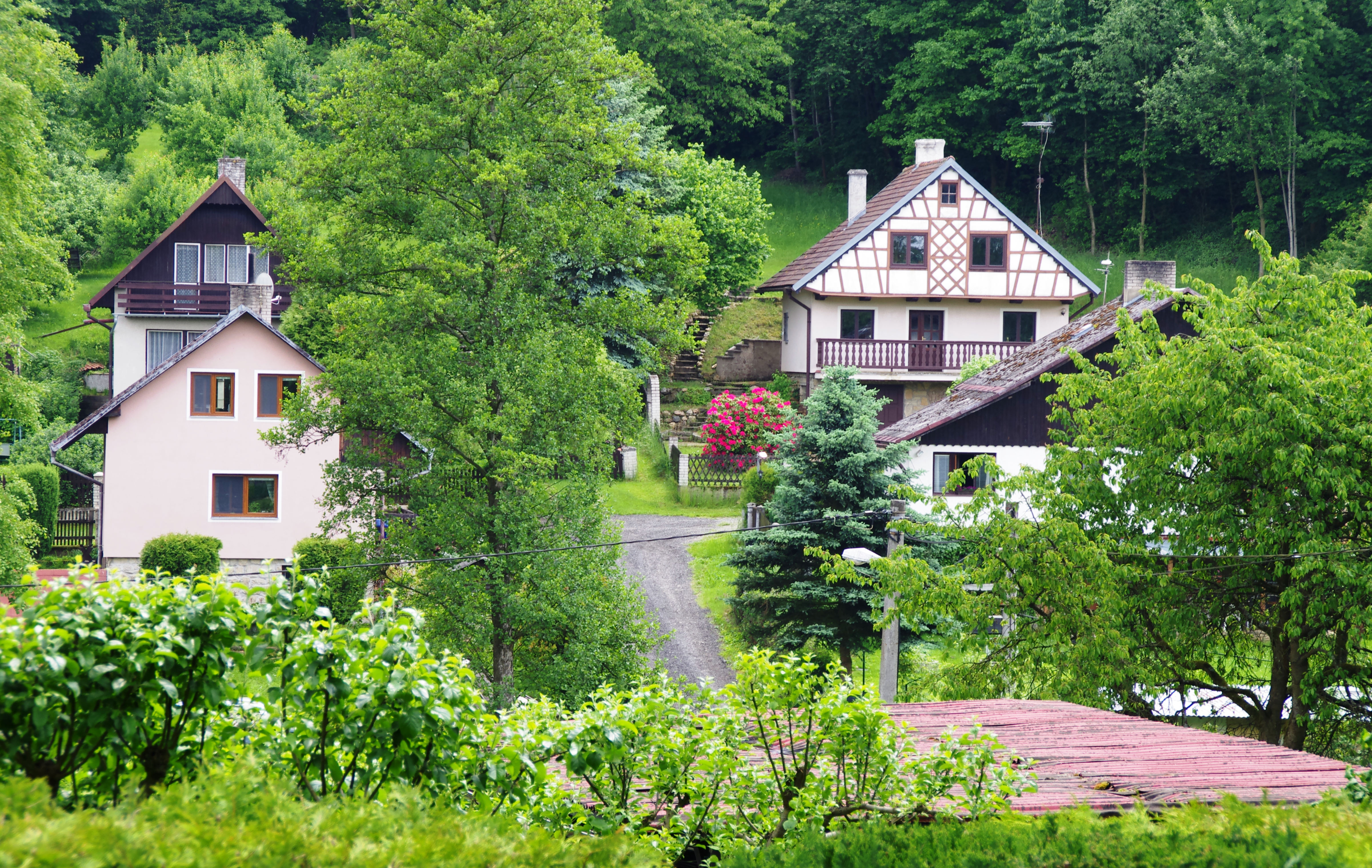 Horní Lažany, chatařská oblast This image was acquired during the event Wikiměsto Mariánské Lázně.